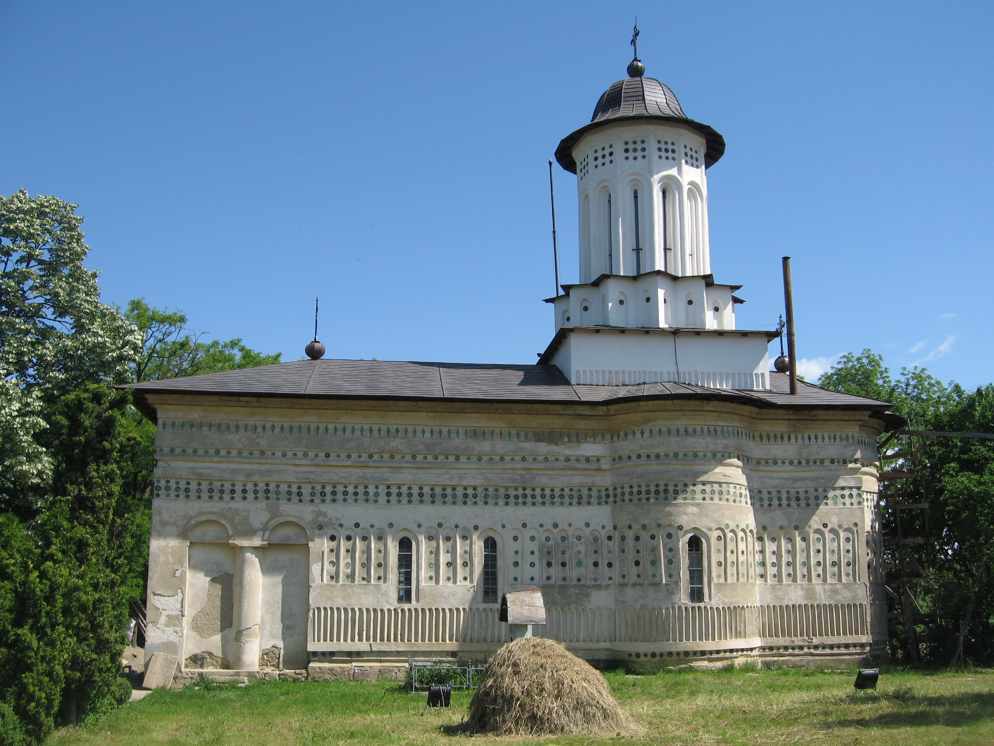 Mănăstirea Aroneanu